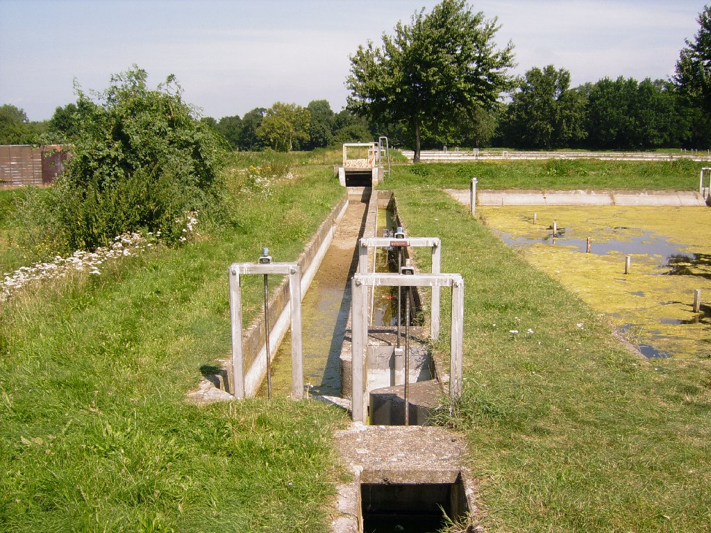 Verteilergraben Rieselfeld Karolinenhöhe